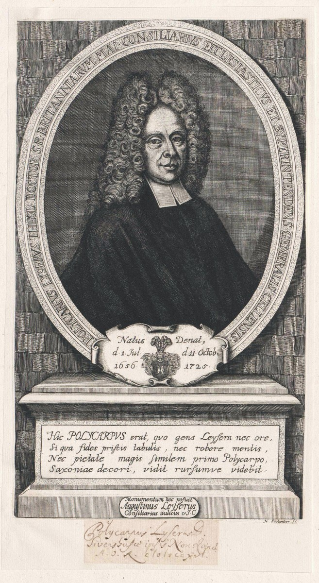 Scna aus dem Bildarchiv Austria